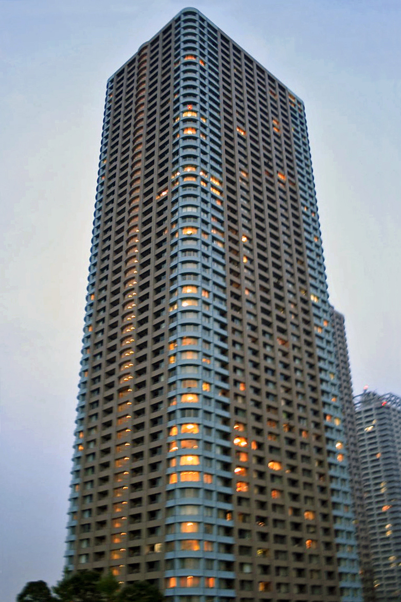 大川端リバーシティ21センチュリーパークタワー 東京